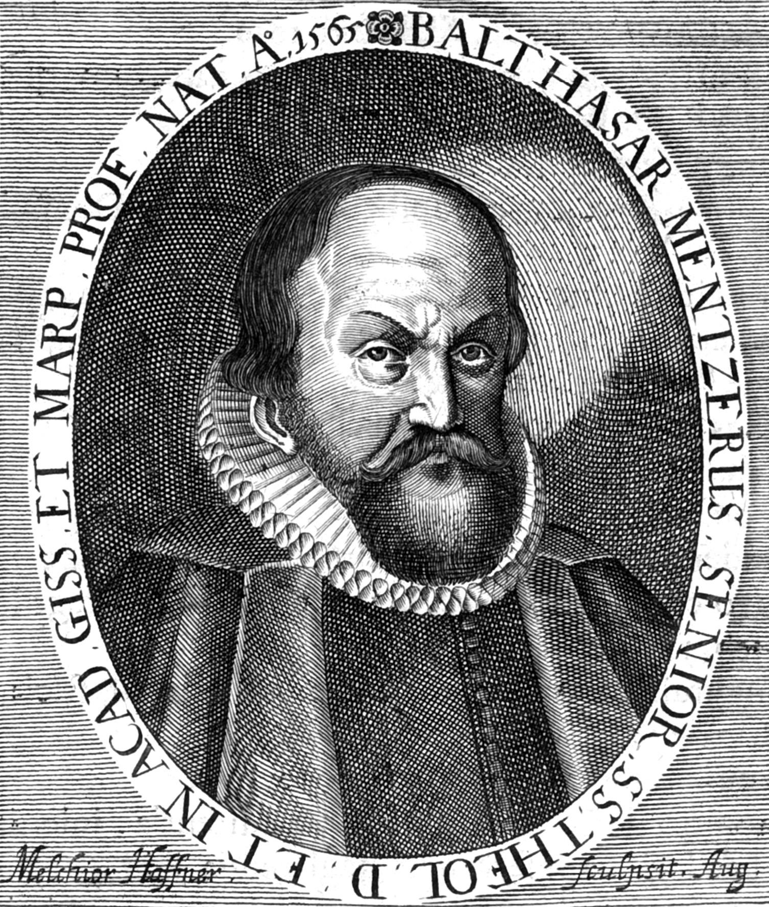 Balthasar Mentzer (1565–1627), deutscher evangelischer Theologe.Kupferstich